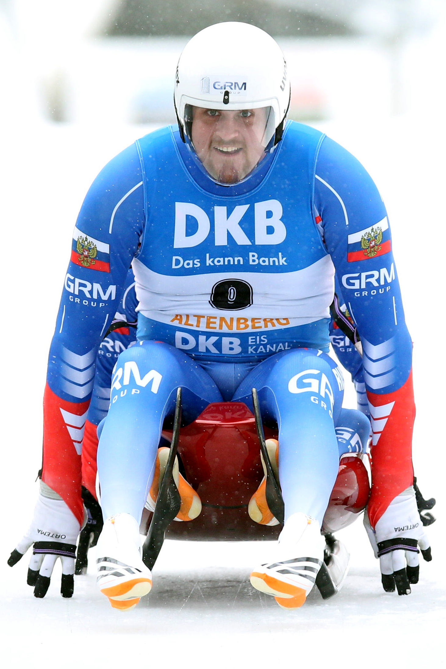 Alexander Denisyev und Vladislav Antonov beim Rennrodel-Nationencup der Doppelsitzer in Altenberg 2017